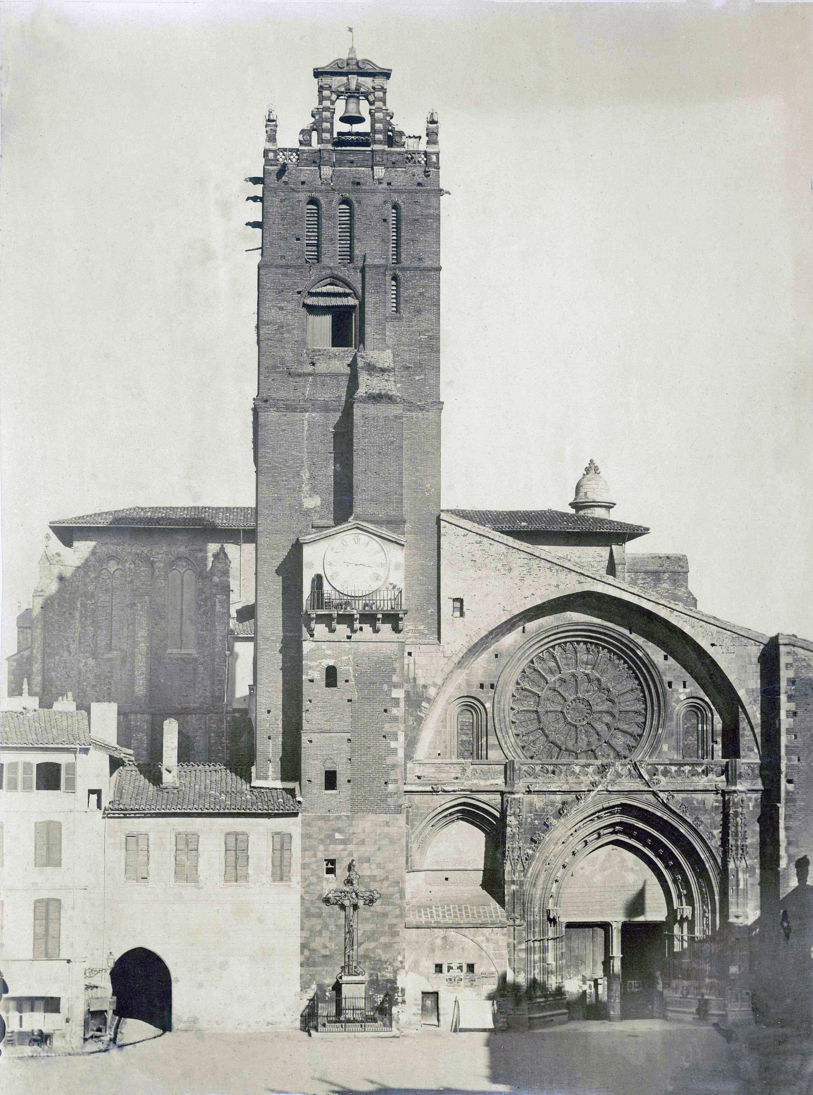 Place et cathédrale Saint-Étienne.Entre 1859 et 1866.Vue d'ensemble de la cathédrale prise depuis la place. Modalités d'entrée : Achat du 10/07/2001.